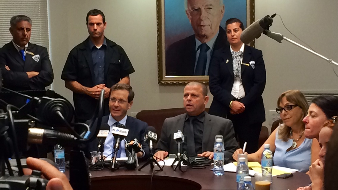 כבל מנהל את ישיבת סיעת העבודה בכנסת, מאי 2014. לצדו יו״ר המפלגה, יצחק הרצוג